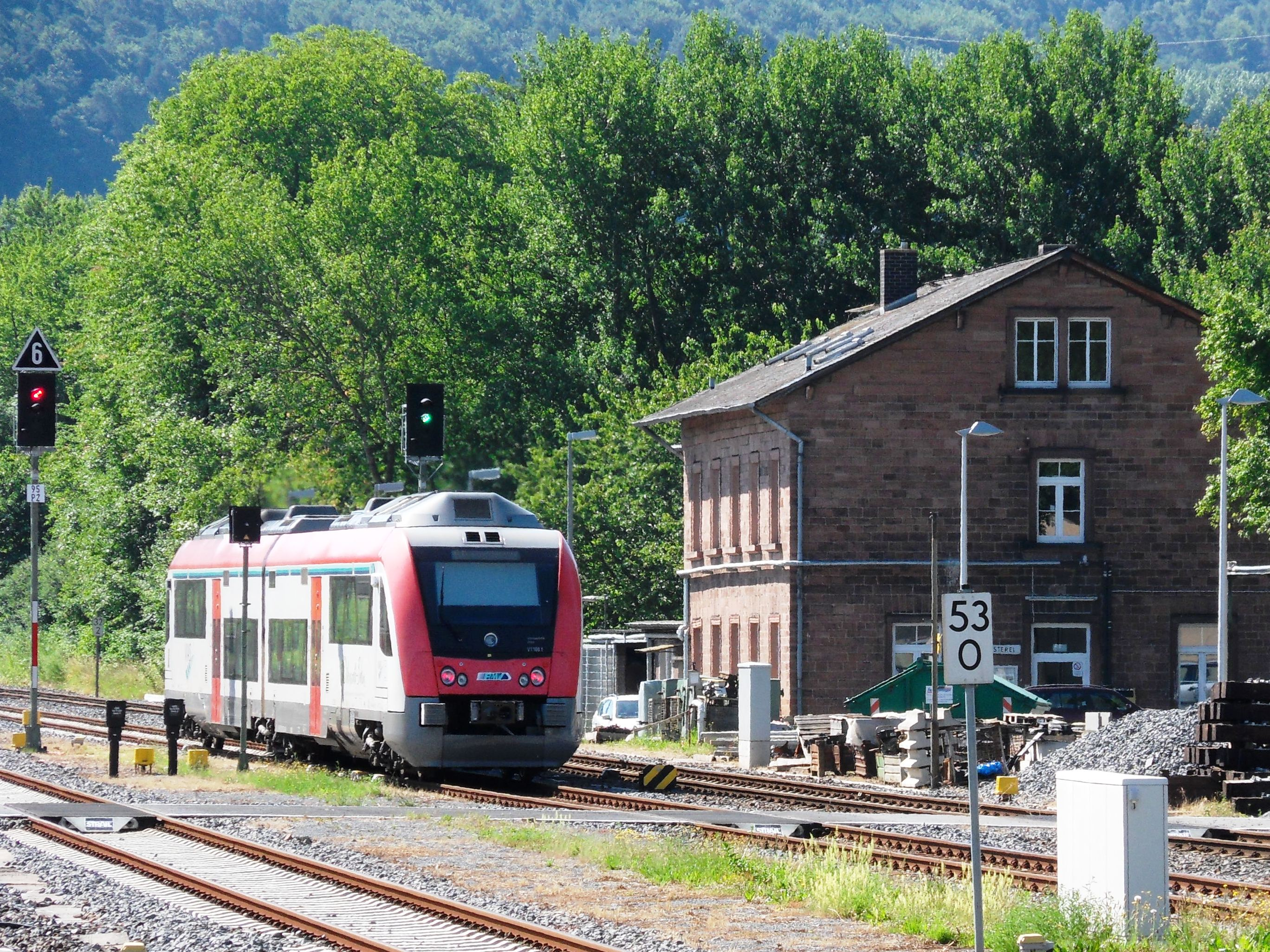 Die Bahnmeisterei von Groß-Umstadt Wiebelsbach mit einem Richtung Süden ausfahrenden Itino